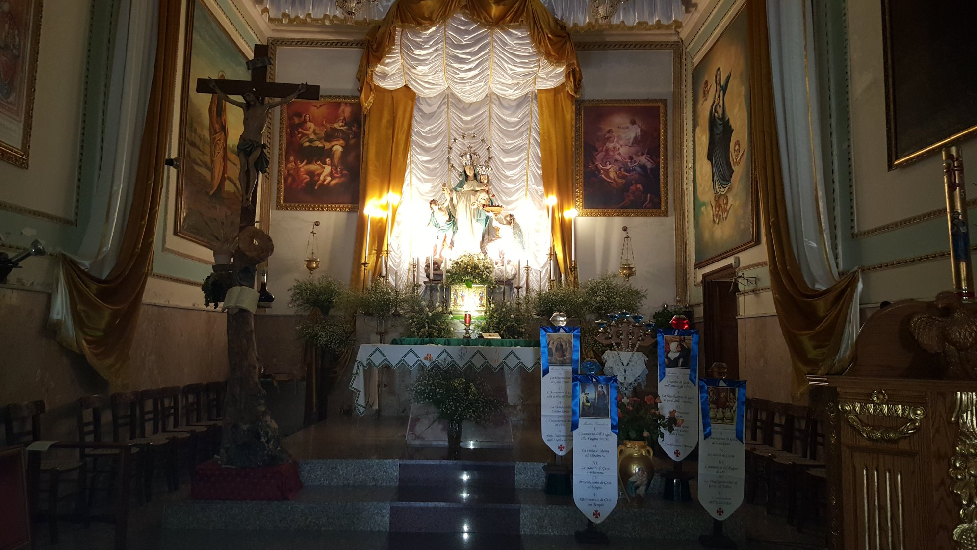 Altare